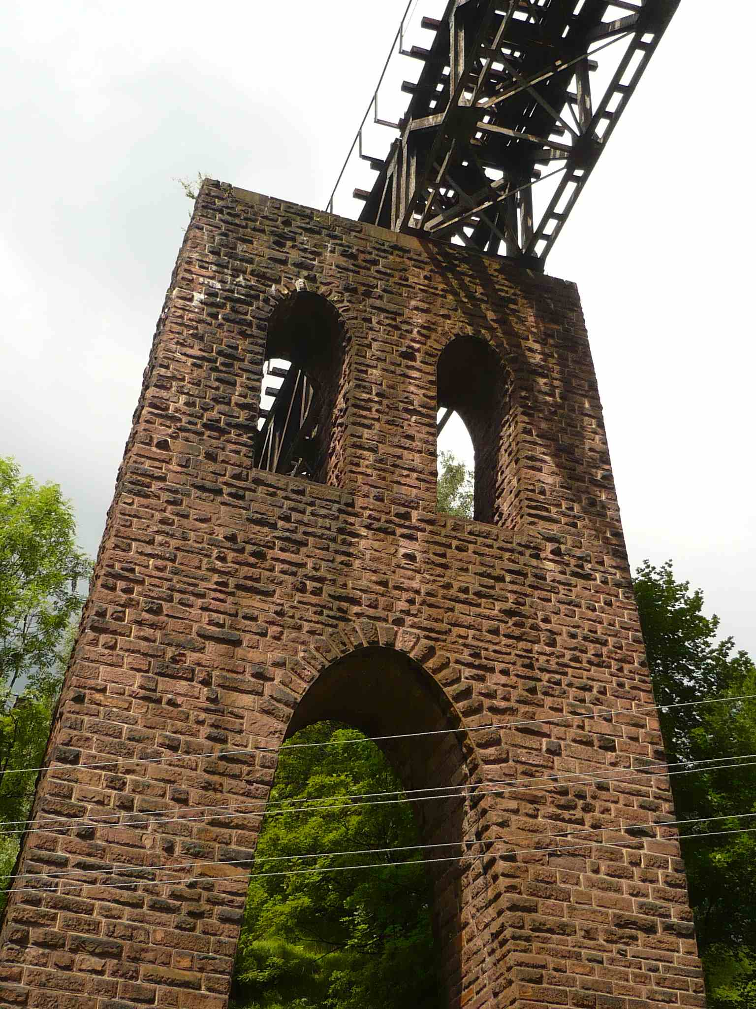 Nowa Ruda, wiadukt kolejowy